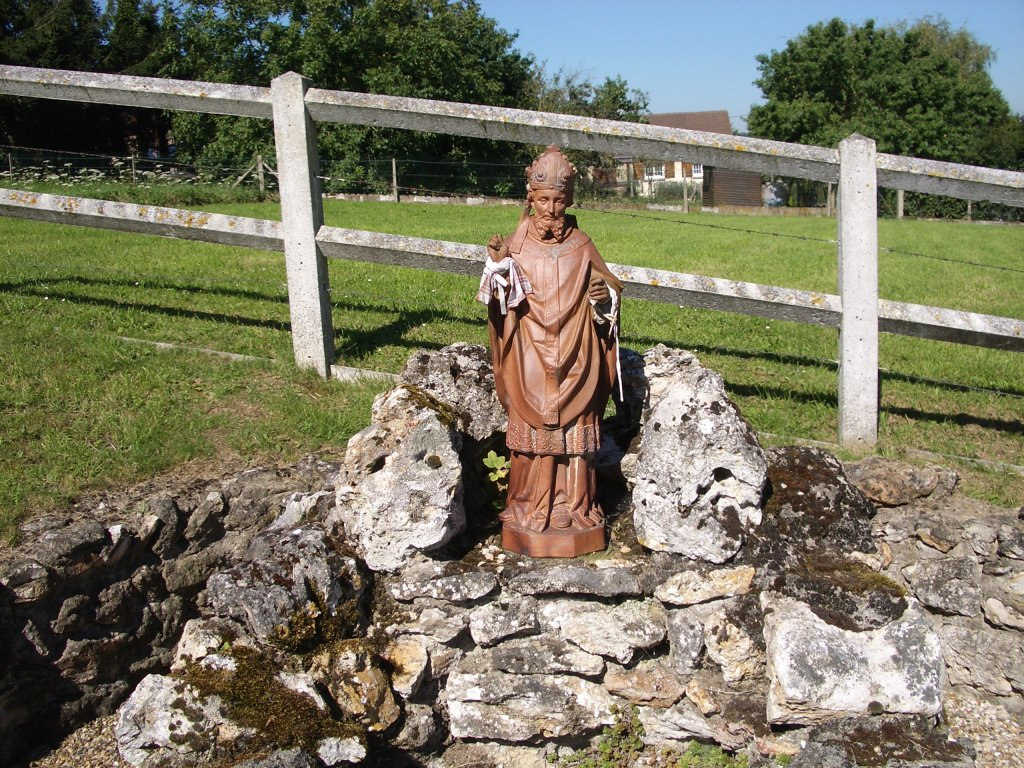 Statue de Saint Ursin devant la source de Villers-sur-le-Roule (Eure)